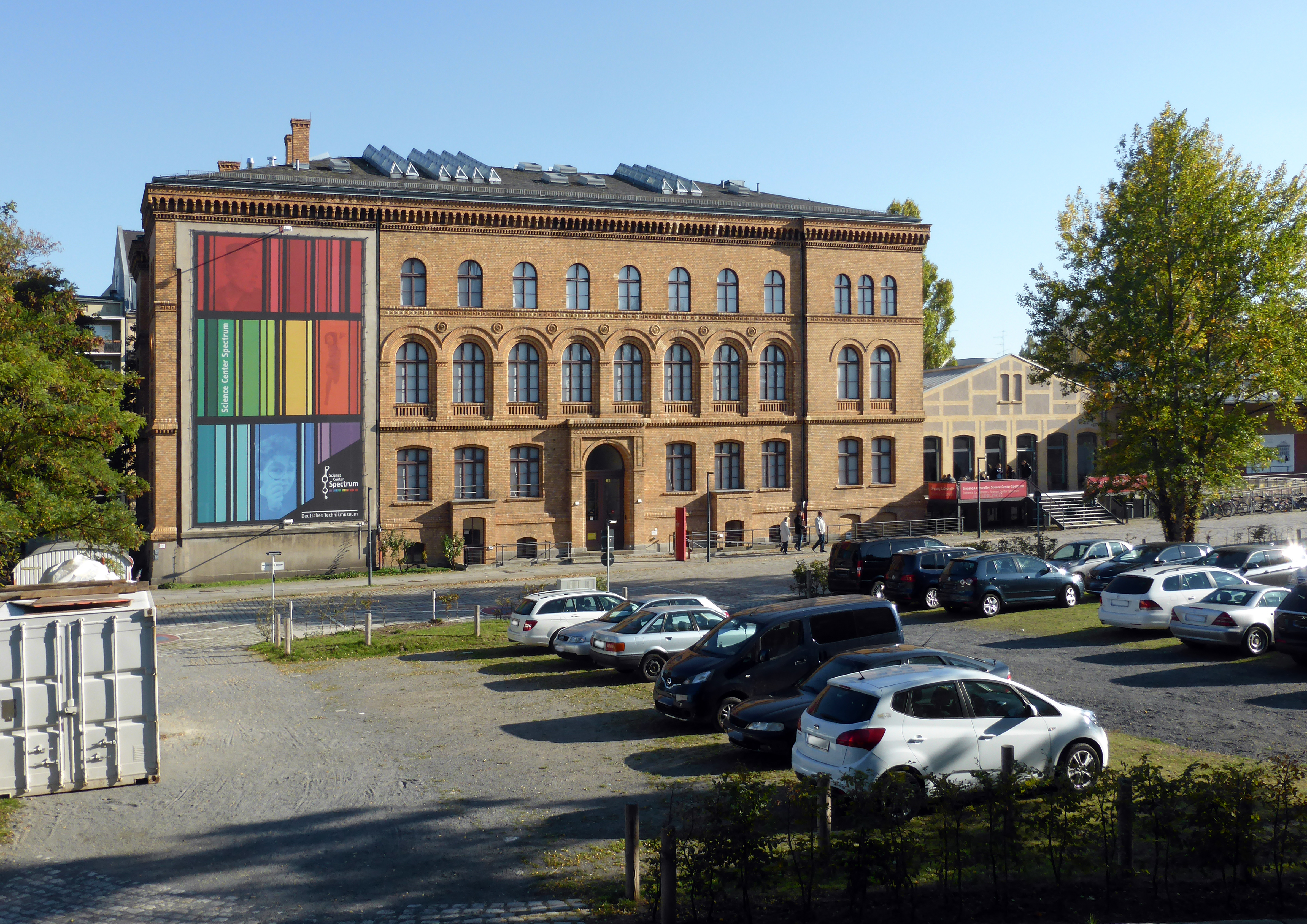 Verwaltungs- und Ausstellungsgebäude Anhalter Bahnhof. Deutsches Technikmuseum in Berlin. Wikipedianische KulTour am 10. Oktober 2015 in der Ausstellung des Museums.